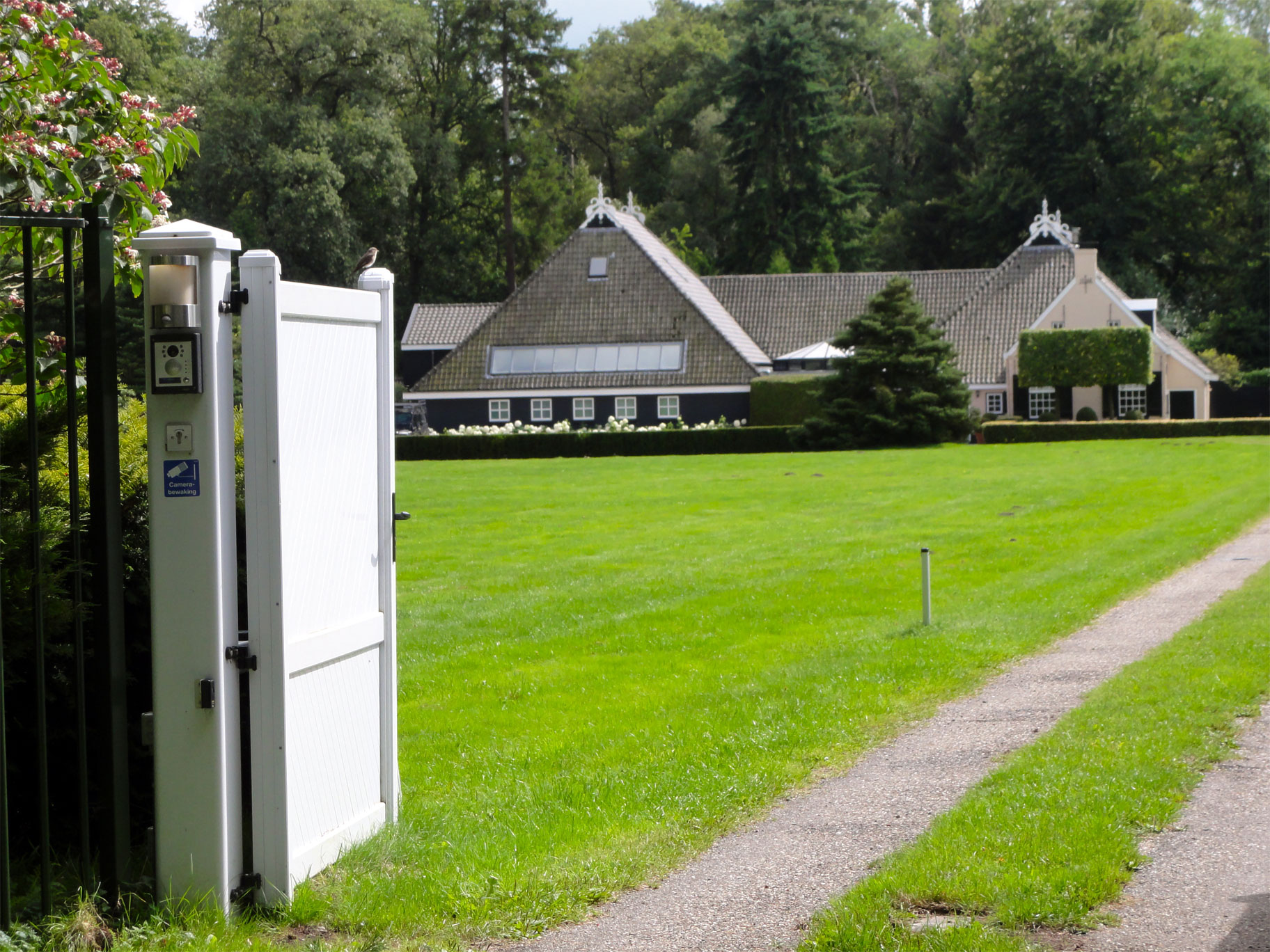 Boerderij Poostweg 2 Beetsterzwaag